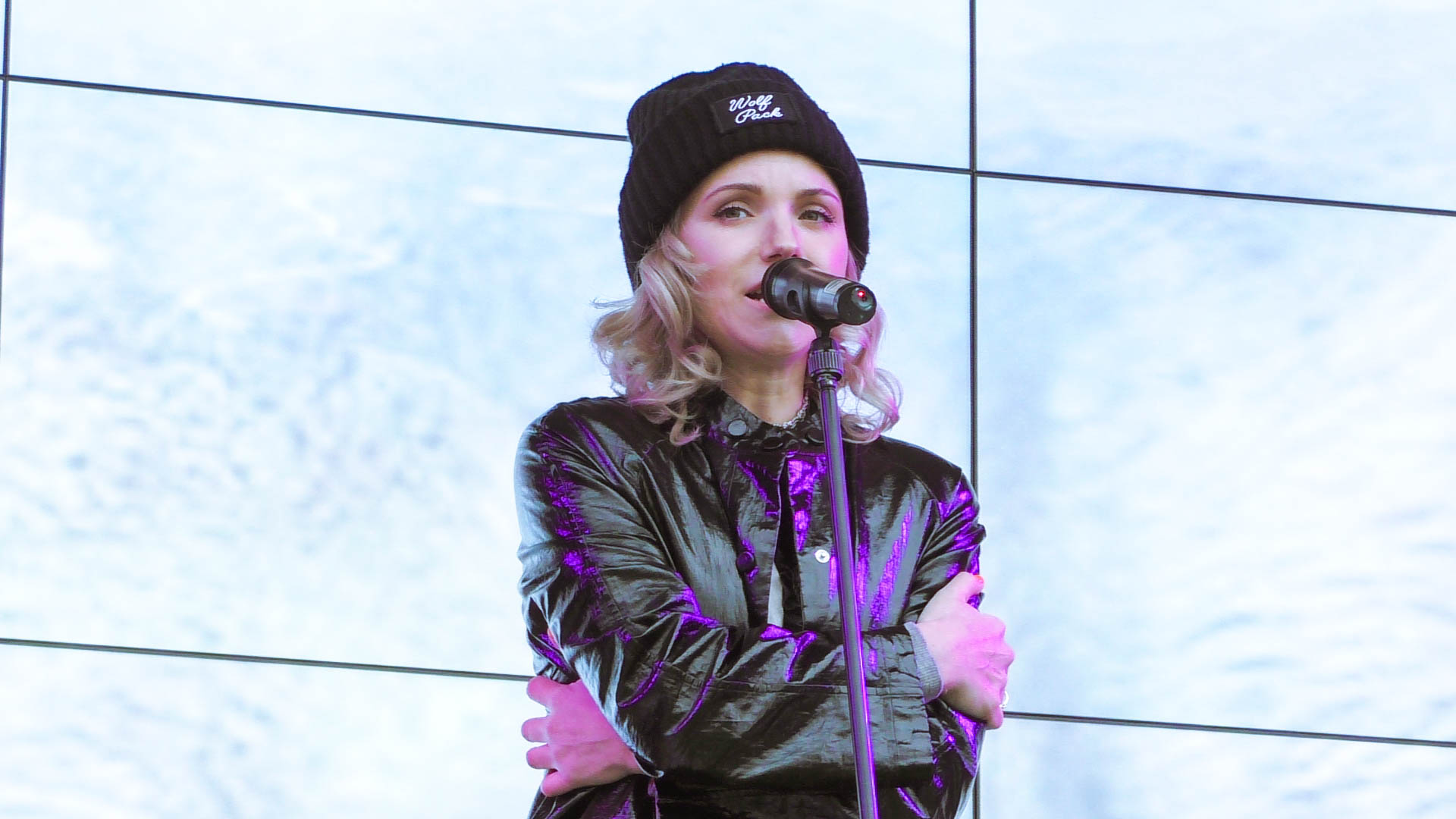 21.10.2017. Москва, Манежная площадь, праздник этичного образа жизни "Эмпатия".